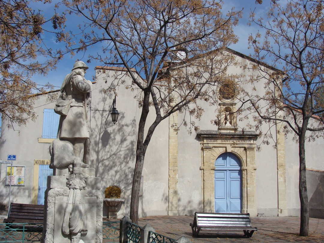 L'église Saint-Valentin, place Louis-Sacoman à la Valentine (Marseille 11e)